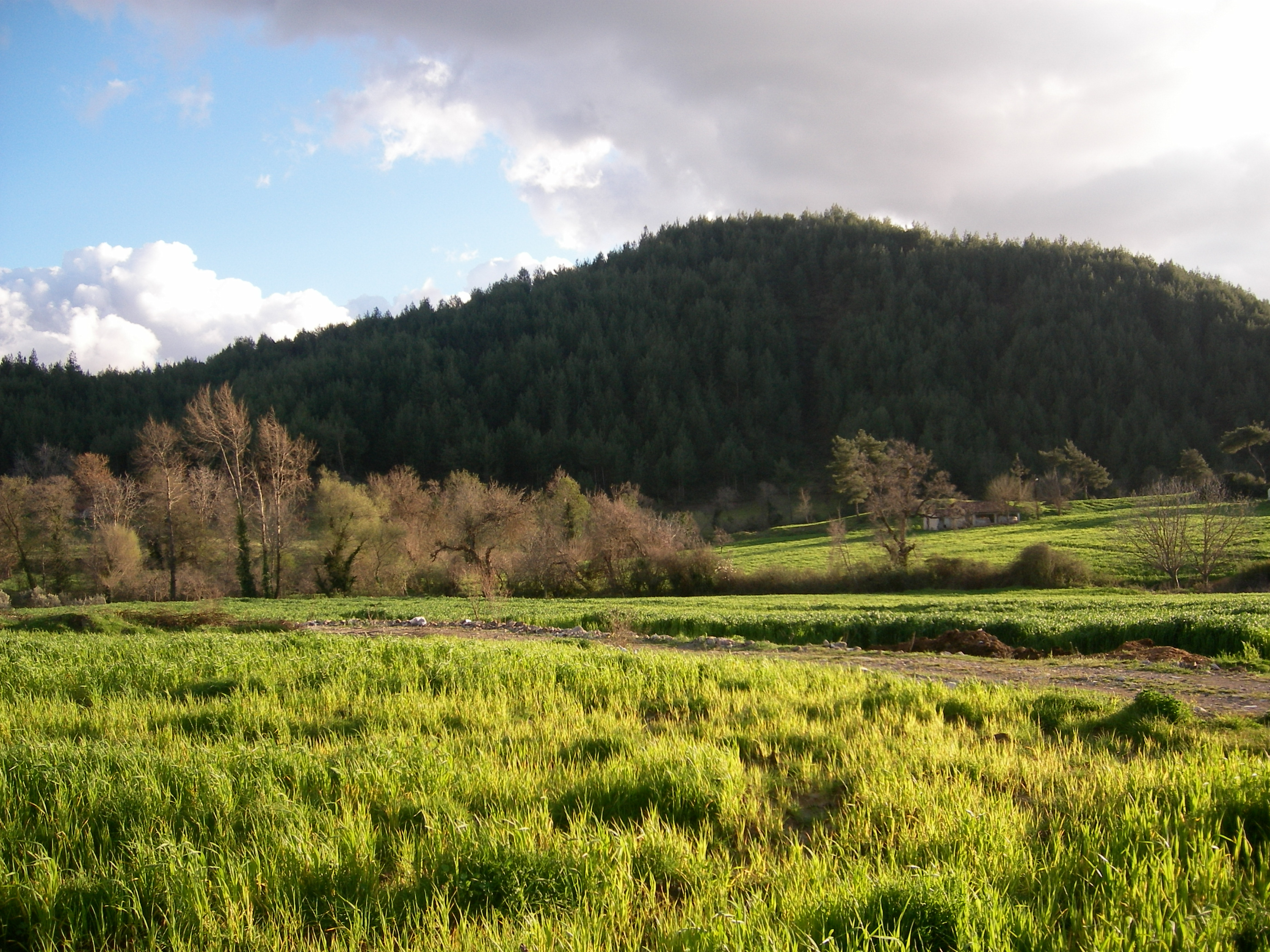 Yayladağı'nın yeşil ormanları ve tarlaları